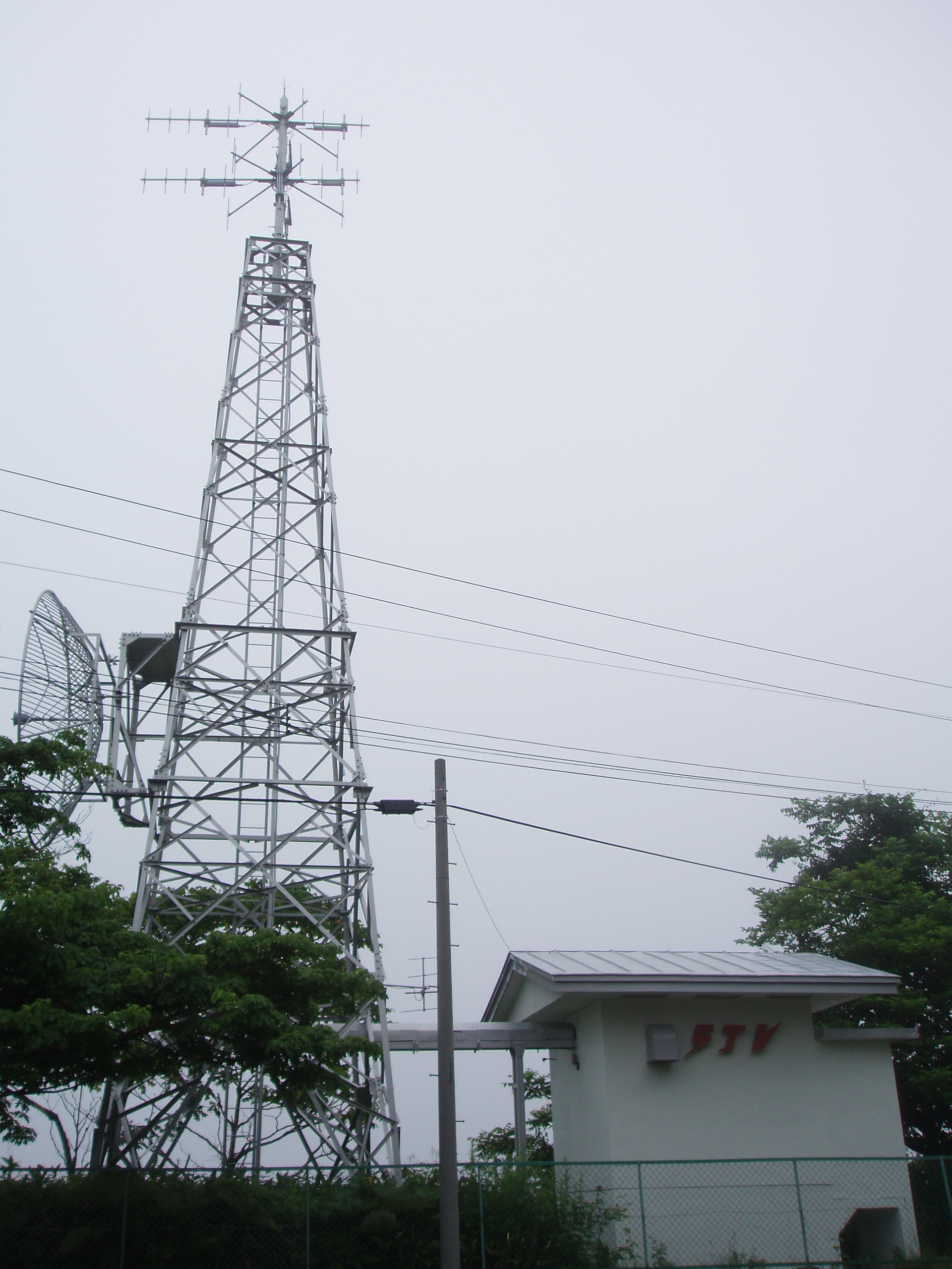 広尾中継局 STV送信設備